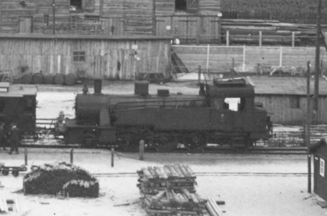 Parowóz OKl1 (pruski serii T6) na bocznicy kolejowej podczas budowy portu w Gdyni, 1929 r.